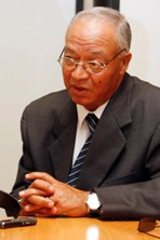 L'écrivain marocain Mohamed Sibari.